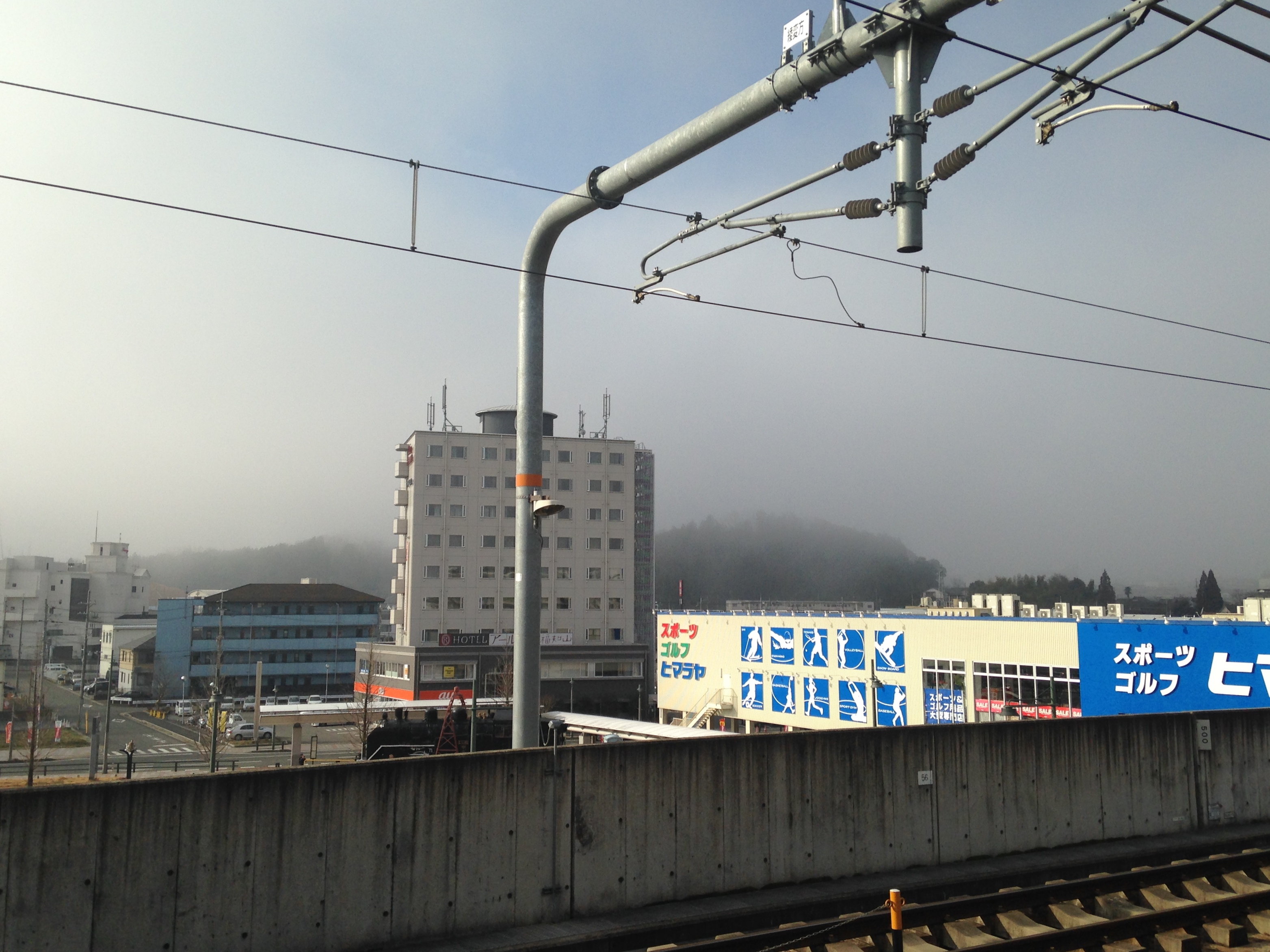 福知山駅より望む霧の日の福知山市